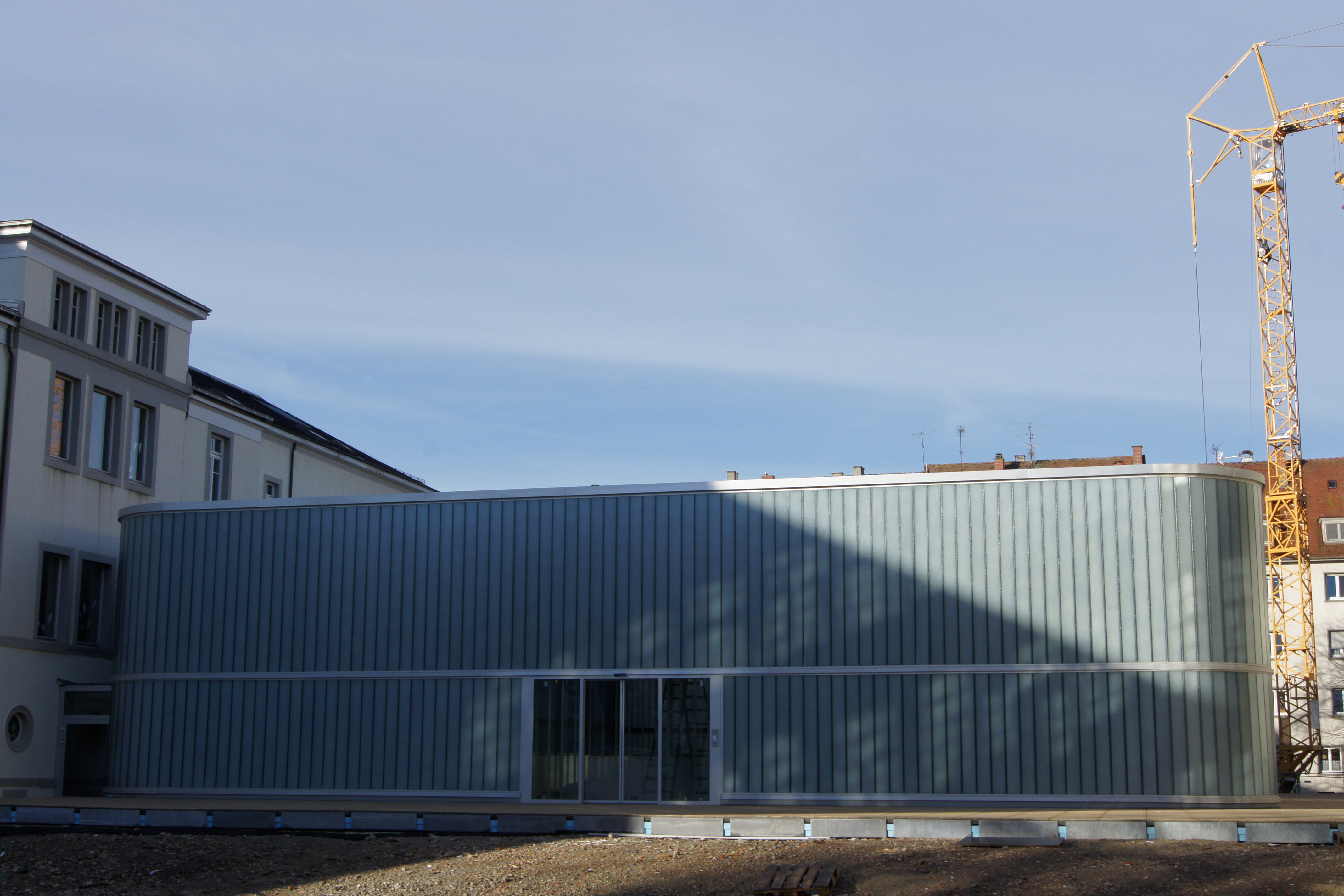 Ellenrieder-Gymnasium Sporthalle